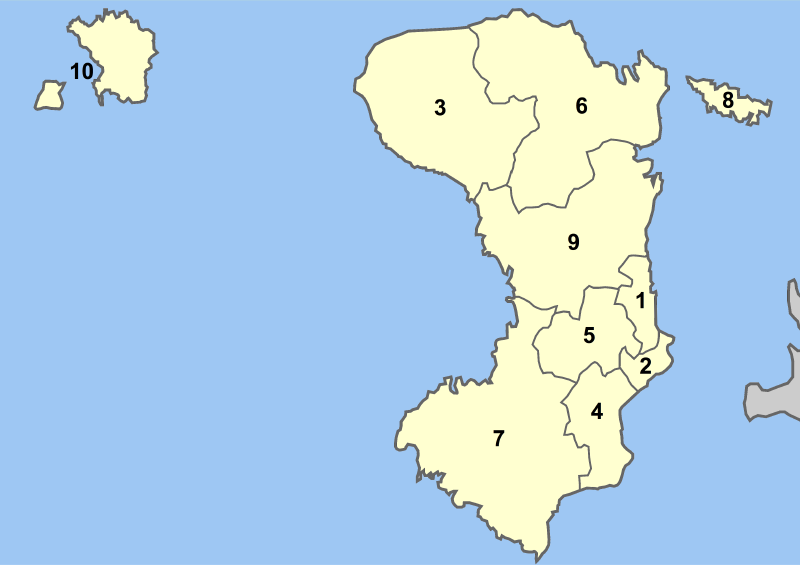 Map of Chios prefecture (Greece) with administrative divisions (municipalities and communities) numbered in alphabetical order (in greek). Legend: 1. Δήμος Χίου - Chios 2. Δήμος Αγίου Μηνά - Agios Minas 3. Δήμος Αμανής - Amani 4. Δήμος Ιωνίας - Ionia 5. Δήμος Καμποχώρων - Kambochora 6. Δήμος Καρδαμύλων - Kardamyla 7. Δήμος Μαστιχοχωρίων - Mastichochoria 8. Δήμος Οινουσσών - Inousses 9. Δήμος Ομηρούπολης - Omiroupoli 10. Δήμος Ψαρών - τα Ψαρά - Psara